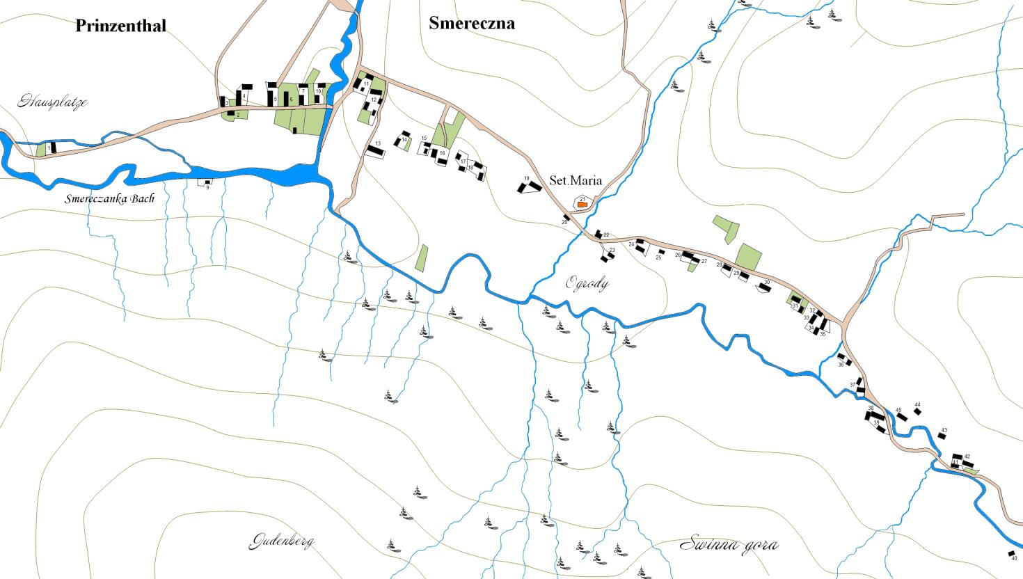 Карта сіл Смеречина та Прінценталь. 1853.